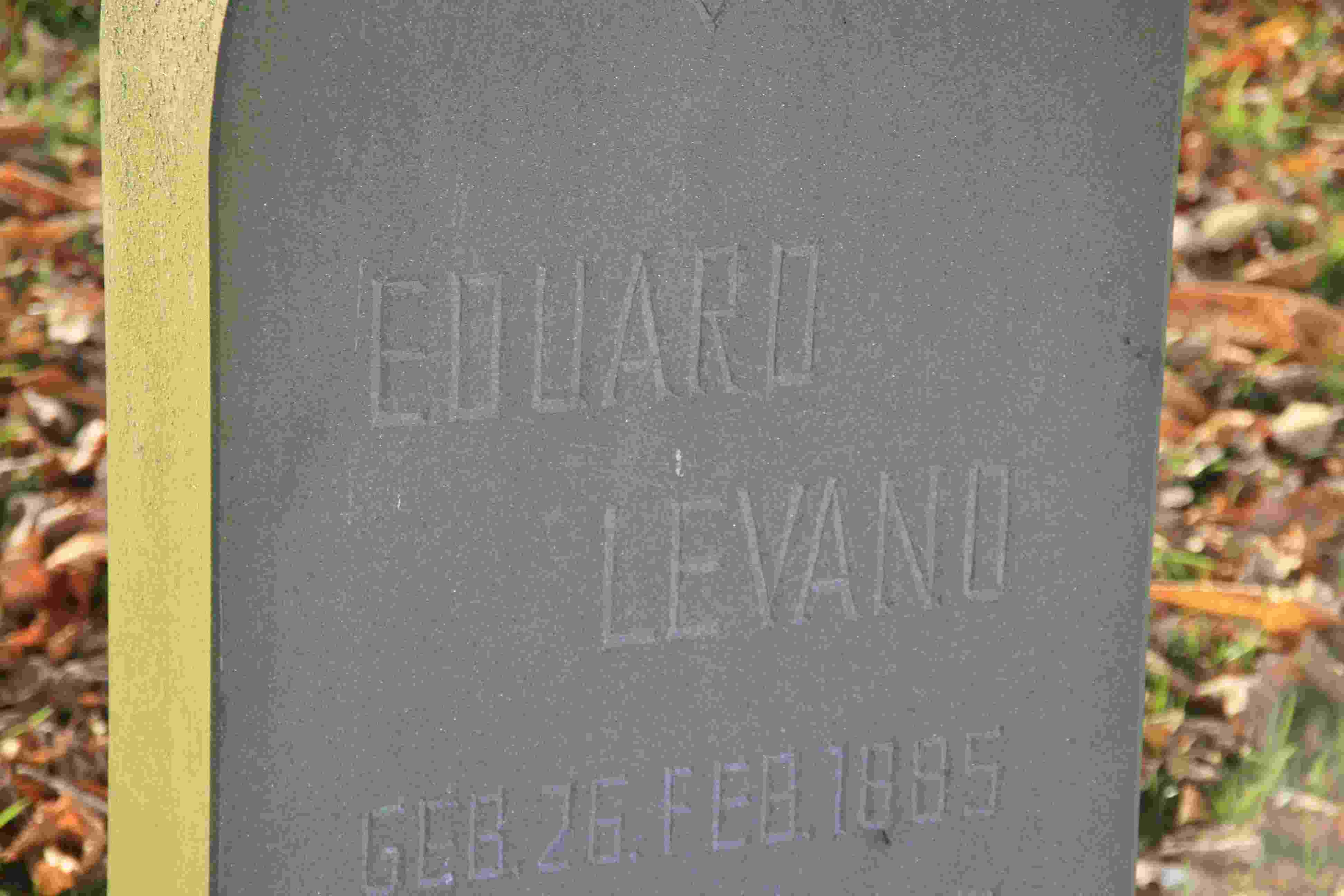 Jüdischer Friedhof Kommern 10